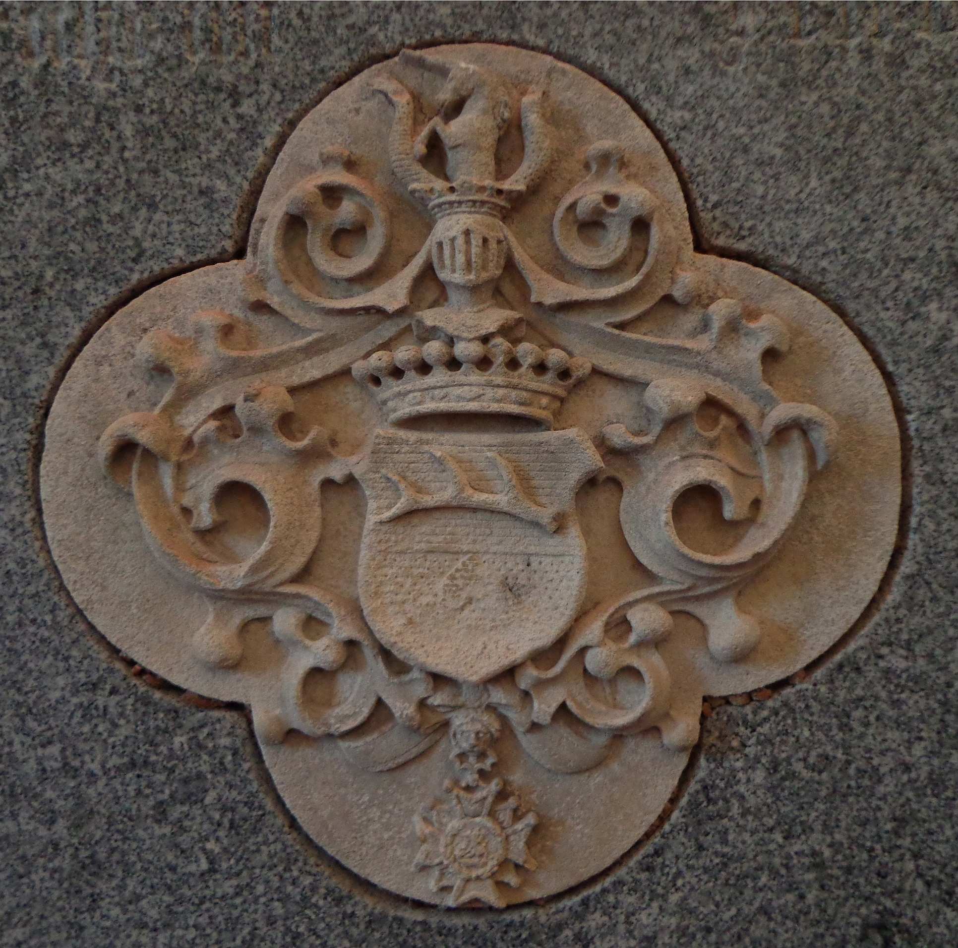 Pfarrkirche St. Martin (Tettenweis), Marienkapelle: Familienwappen auf der ehemaligen Gruftplatte der Grafen von Joner auf Tettenweis. Unter dem Schild die Insignie des bayerischen Hausritterordens vom Heiligen Georg